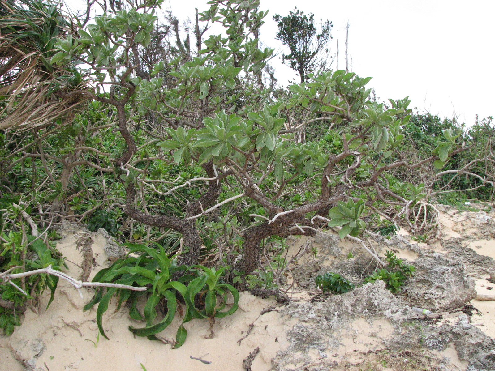 モンパノキ(西表島)/Heliotropium foertherianum@Iriomote isl Japan